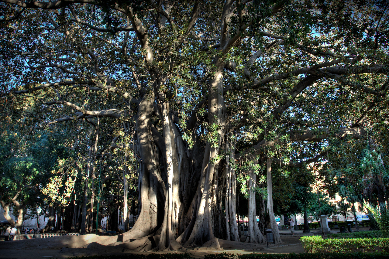 F. magnolioides Borzí, syn. F. macrophylla Desf. ex Pers. Una secolare pianta di Ficus magnolioides a Palermo - Piazza Marina.